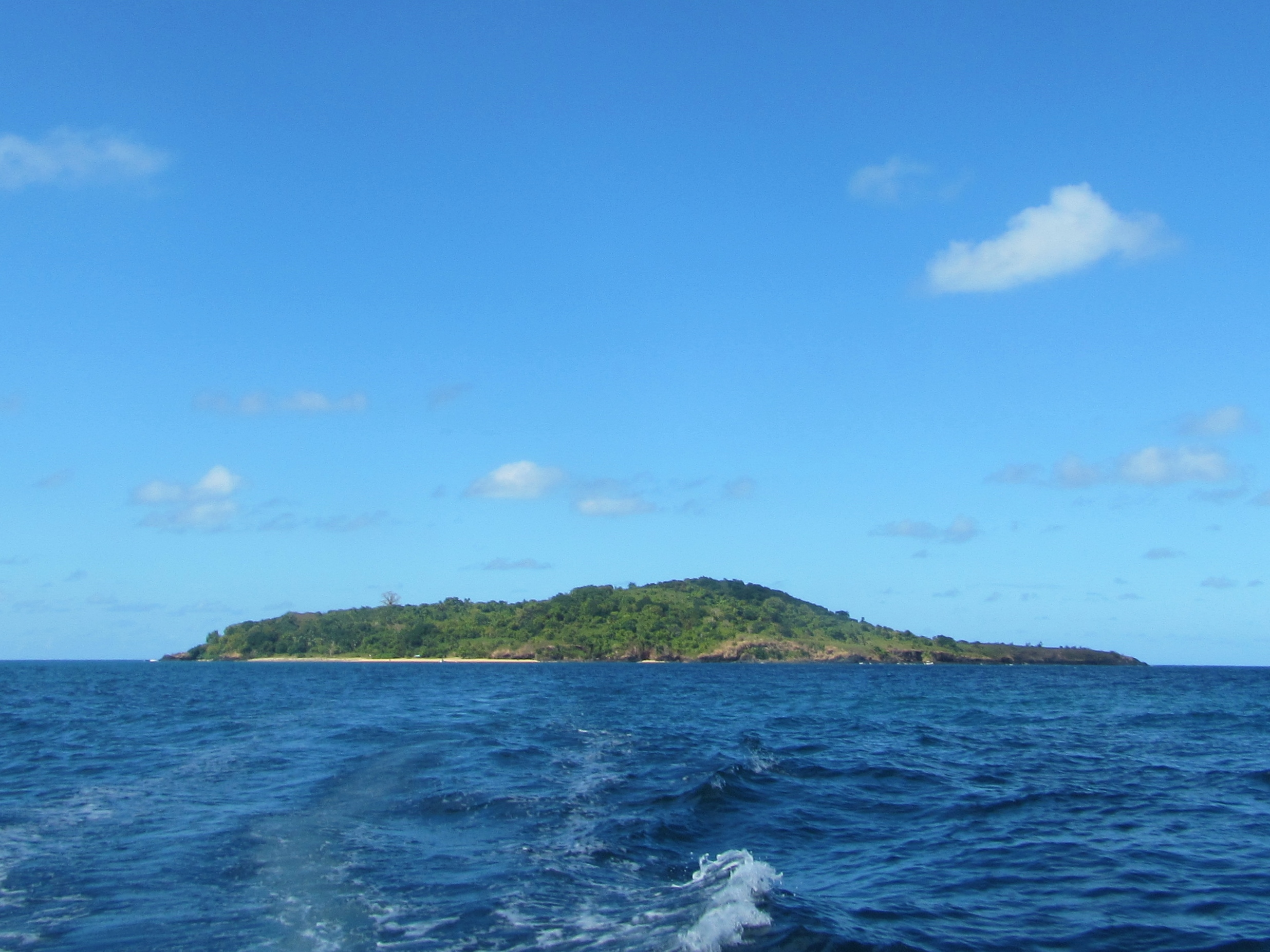 Vue sur l'îlot Bandrélé, à Mayotte, en direction de l'est.